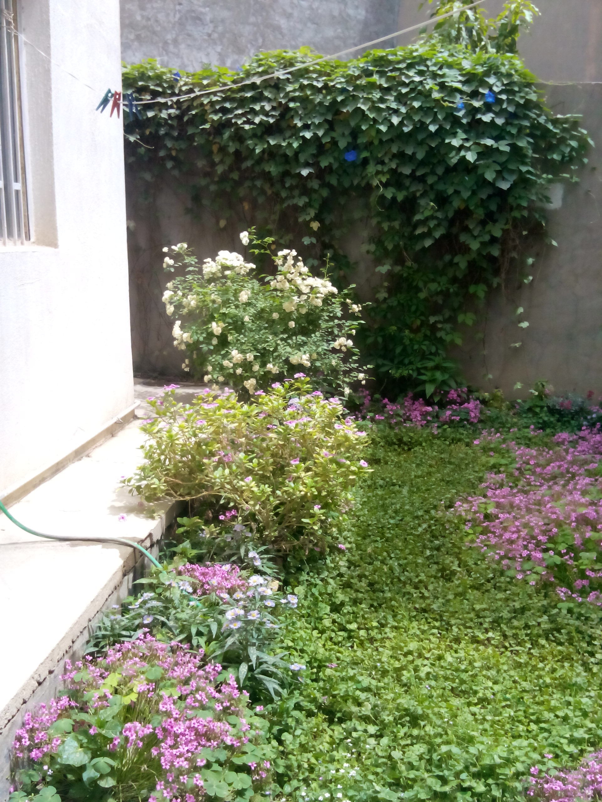 أزهار في حديقة منزلية في بغداد